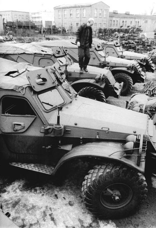 ADN-ZB Bartocha 12.1.90 Neubrandenburg: SPW-Verschrottung - Schützenpanzerwagen der Kampfgruppen werden gegenwärtig verschrottet. Entsprechend dem Ministerratsbeschluß vom 14.12.89 über die Beendigung der Tätigkeit der Kampfgruppen wurde im Reparaturwerk der Bezirksstadt mit der Zerlegung und Verschrottung von SPW aus allen Bezirken der Republik begonnen. (siehe auch 28N)